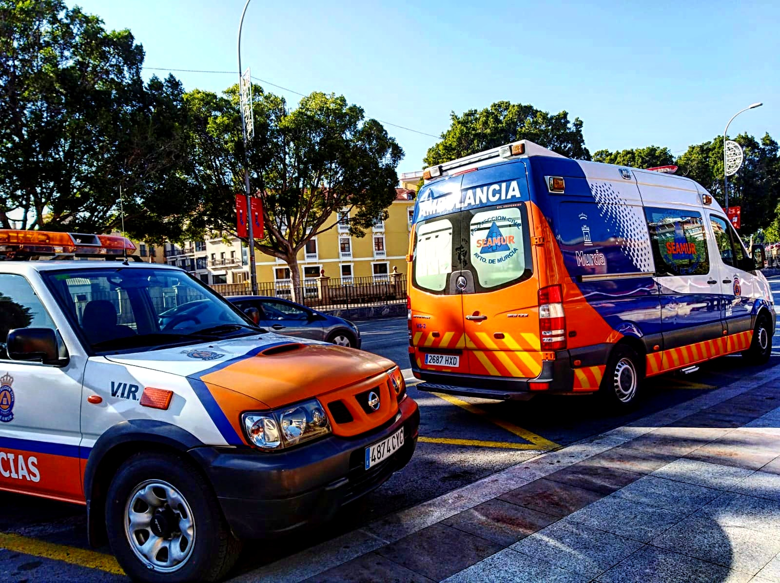 VIR/VS2